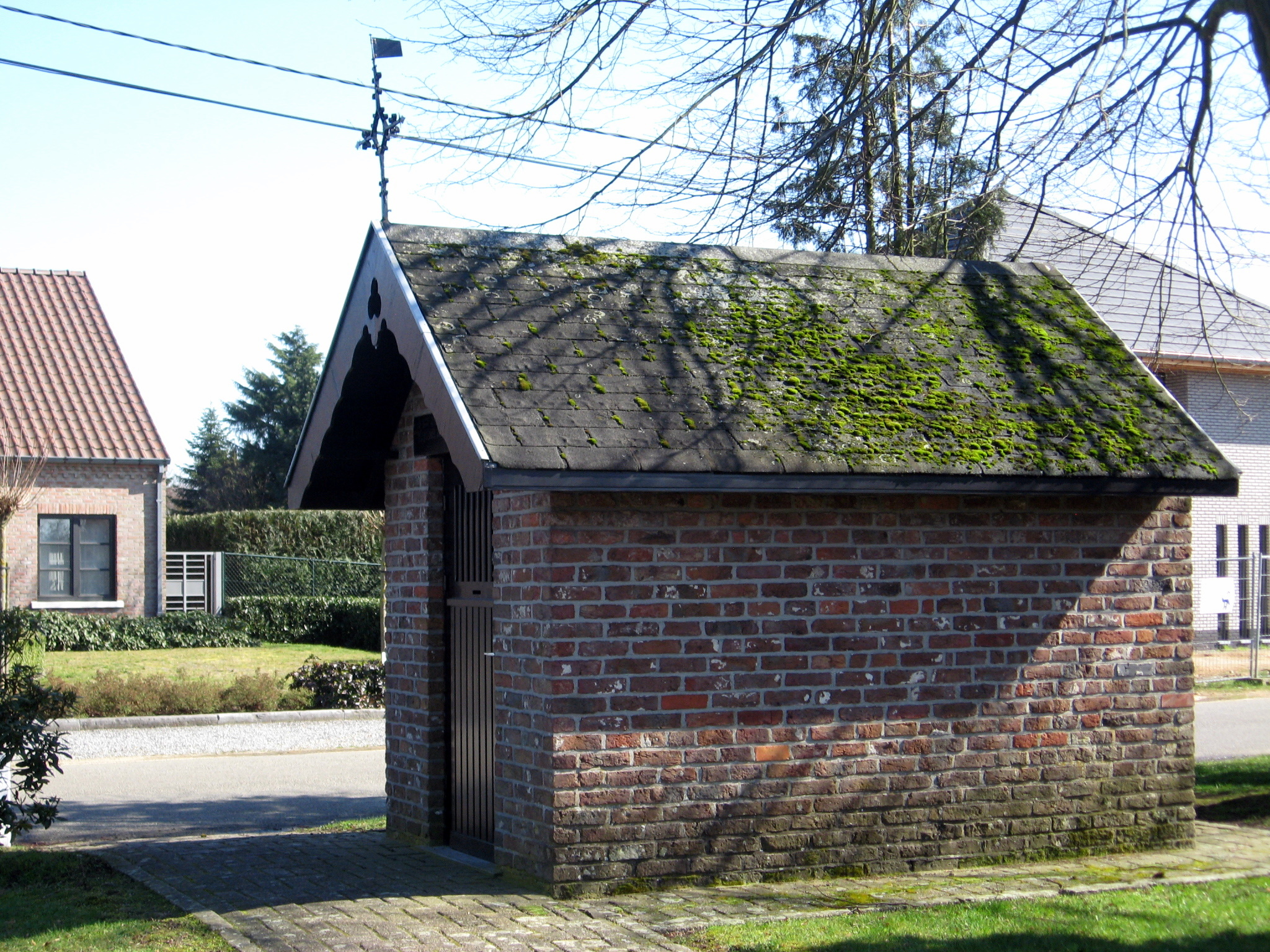 Kapel van Onze-Lieve-Vrouw van Onrust, Kleine Heresteeg in Houthalen